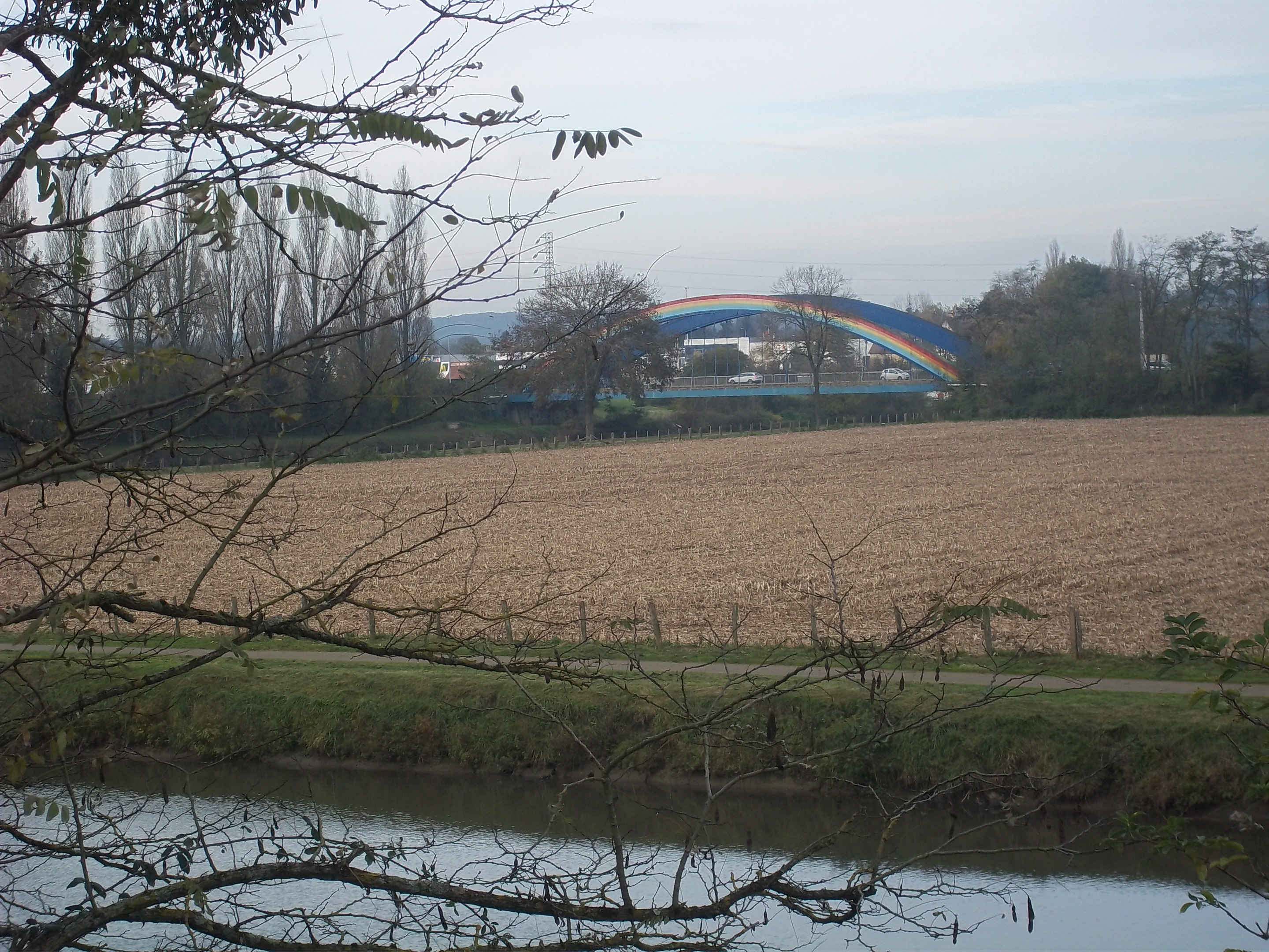 pont entrée de ville